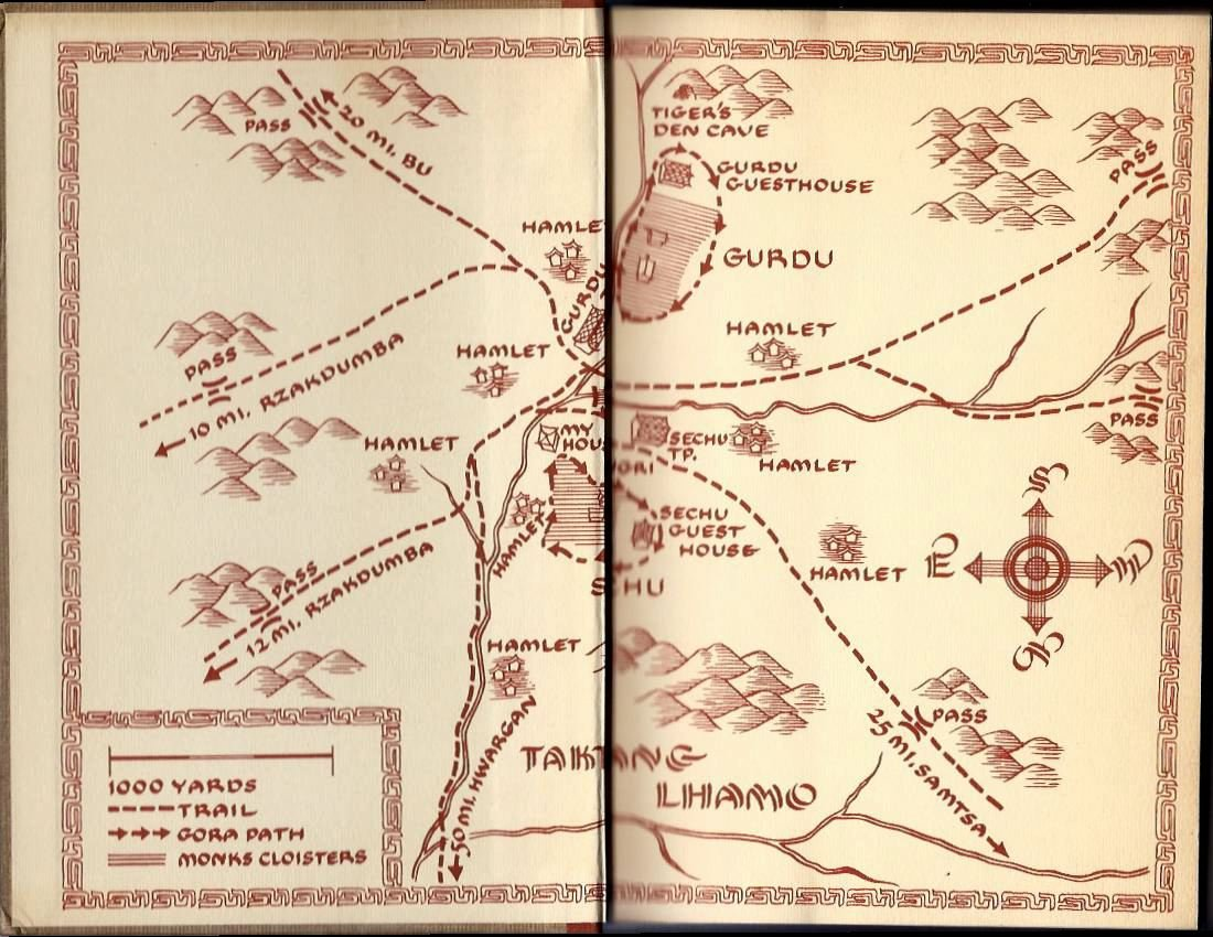 埃克瓦尔在书里刊出的郎木寺手绘图